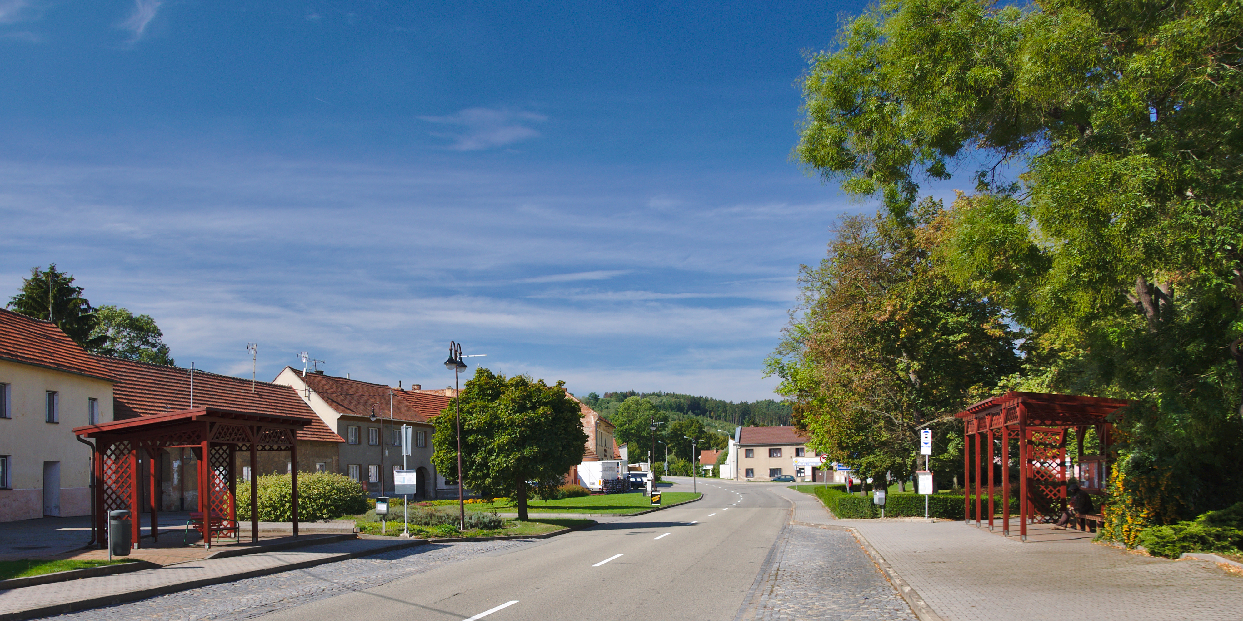 Náves, Svitávka, okres Blansko